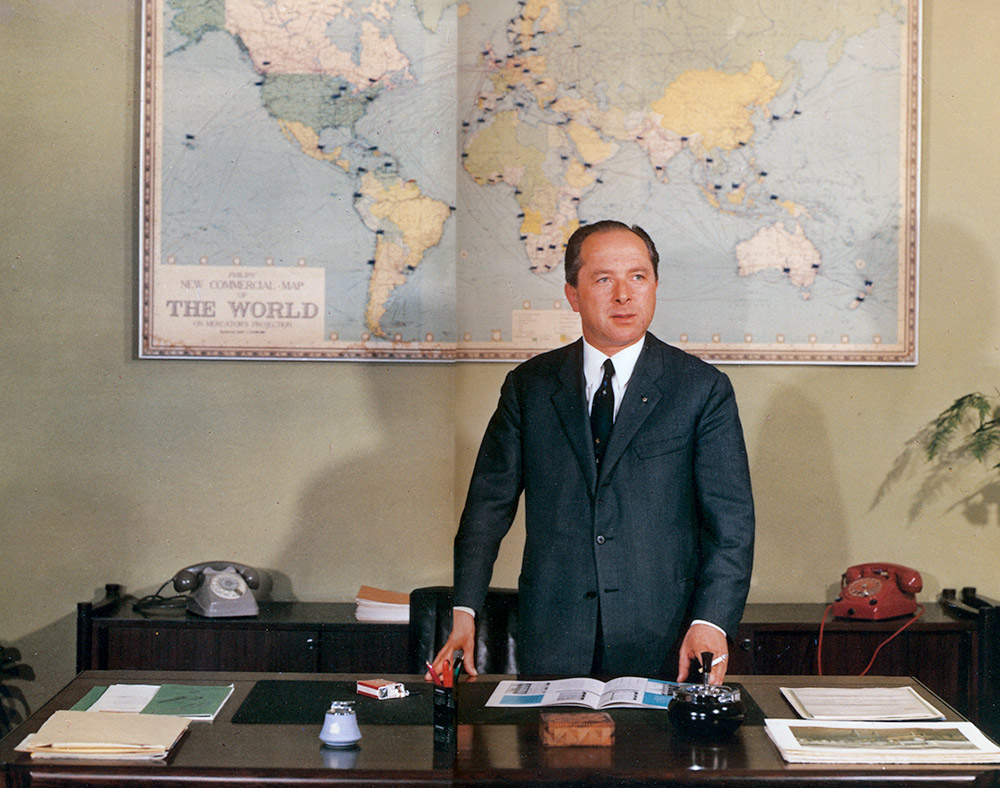 Ritratto dell'imprenditore Oliviero Pigini